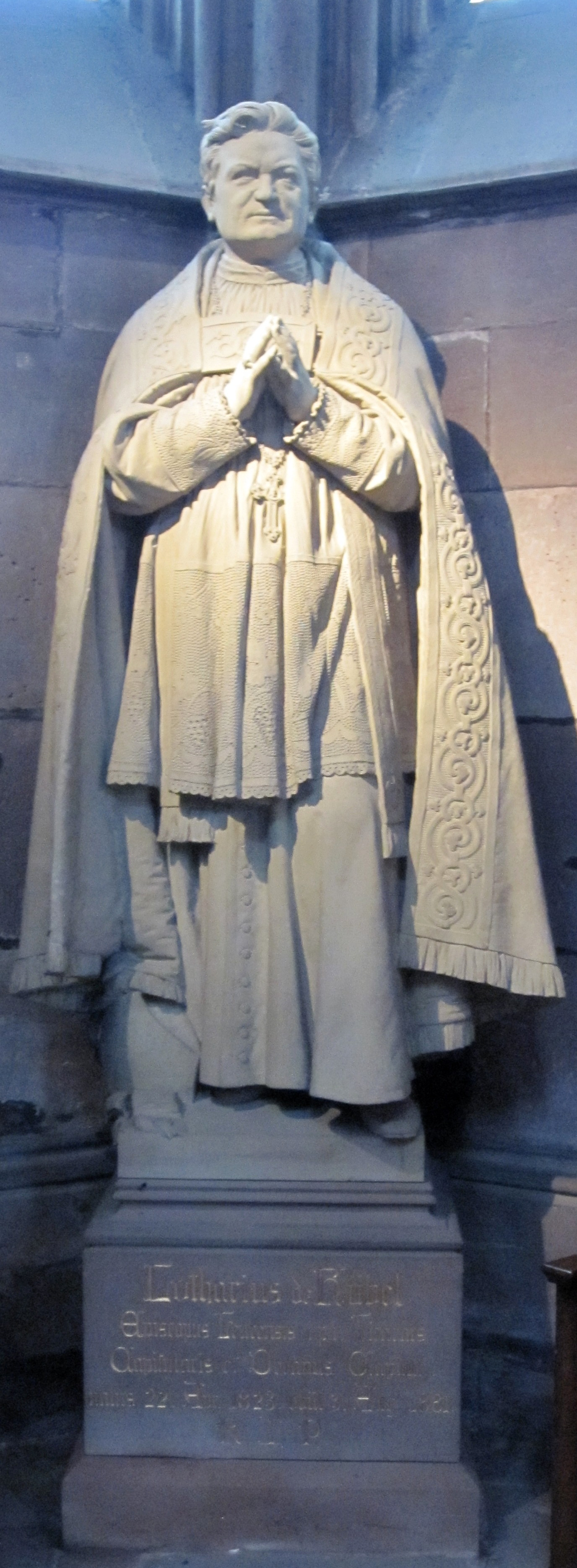 Standbild Diözesanverweser, Weihbischof Lothar von Kübel, 1867-1881.